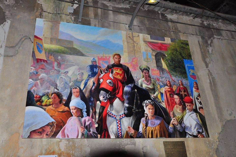 Opera del museo all'aperto nel centro storico di Cosenza